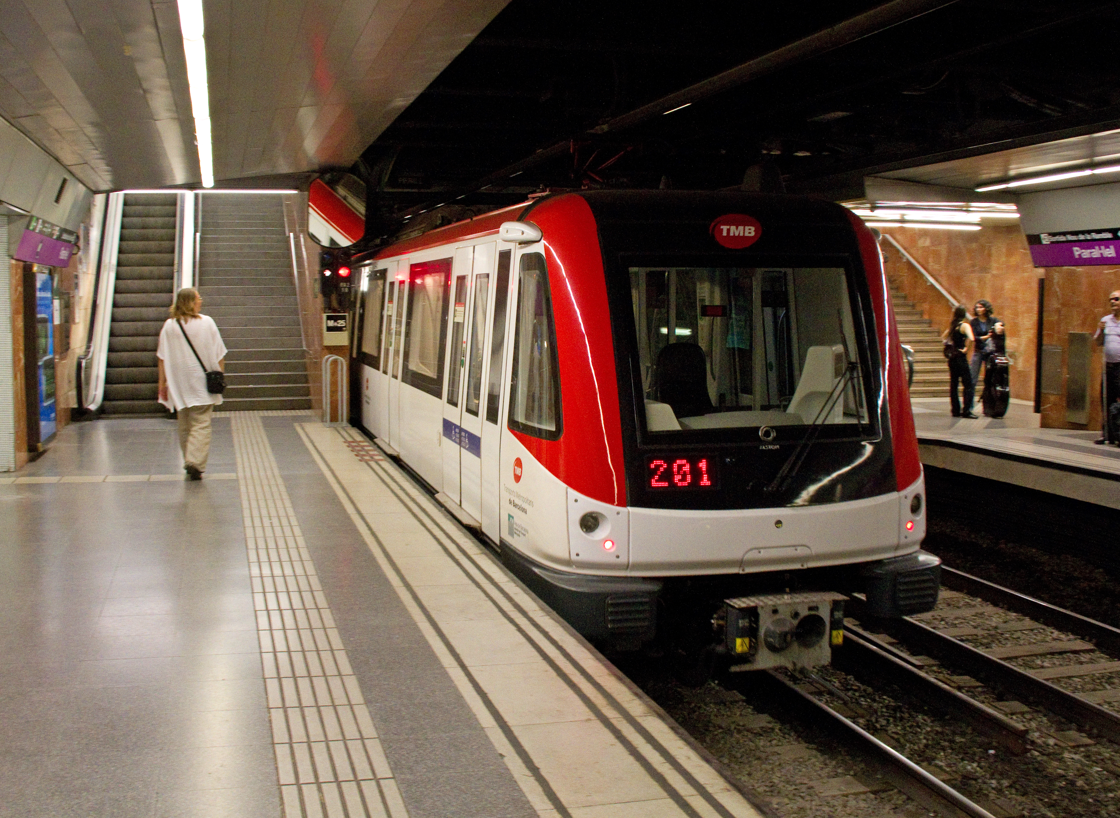 Barcelona Metro, Paral·lel metrostation, Line L2